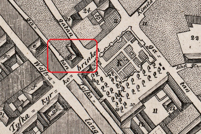 Grundritning över Stockholms stad nr. 1, del visande "Wärdshuset Lejonet" (nr 25) i kv Atlas